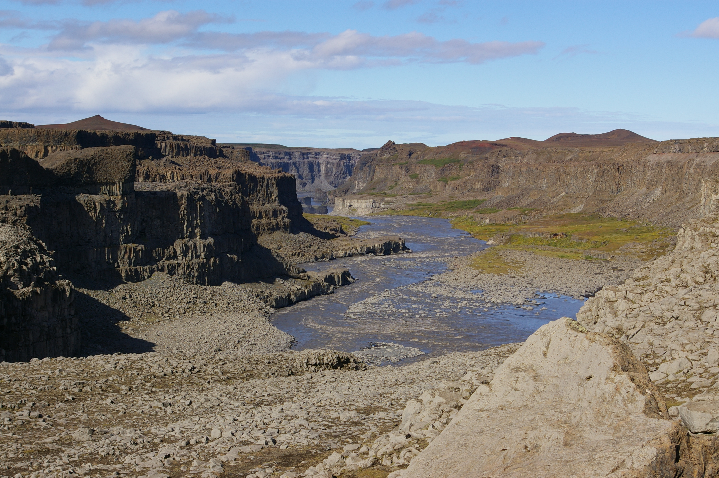 Jökulsá á Fjöllum after Dettifoss, Jökulsárgljúfur